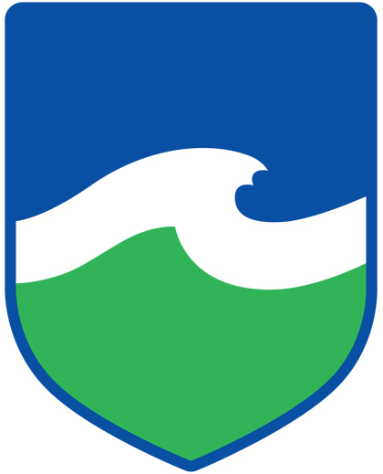 Shield of Gribskov Municipality (2007)